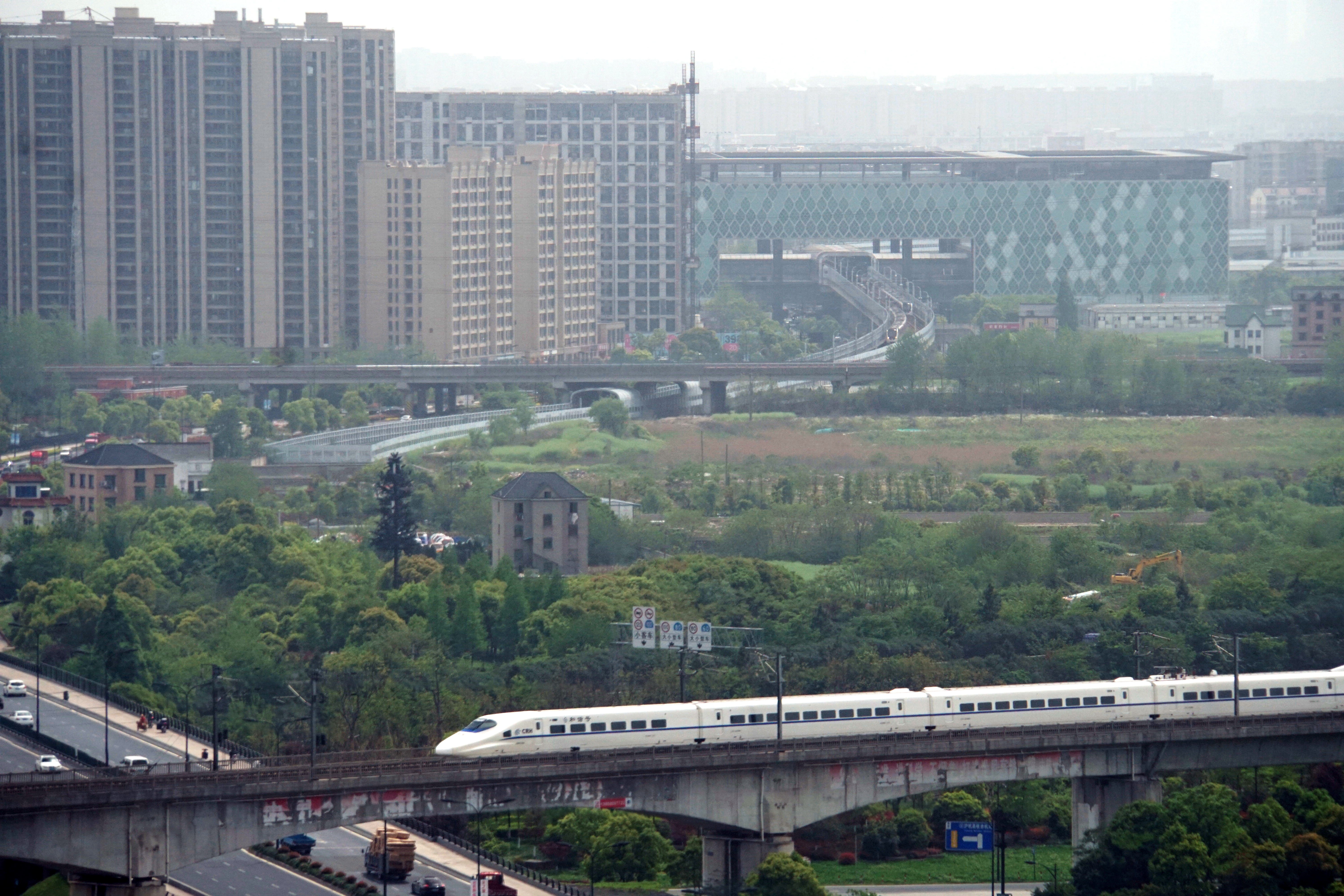 从远处观看地铁翁梅站及1号线入地段全景，前景为通过余杭站的统型CRH2A列车